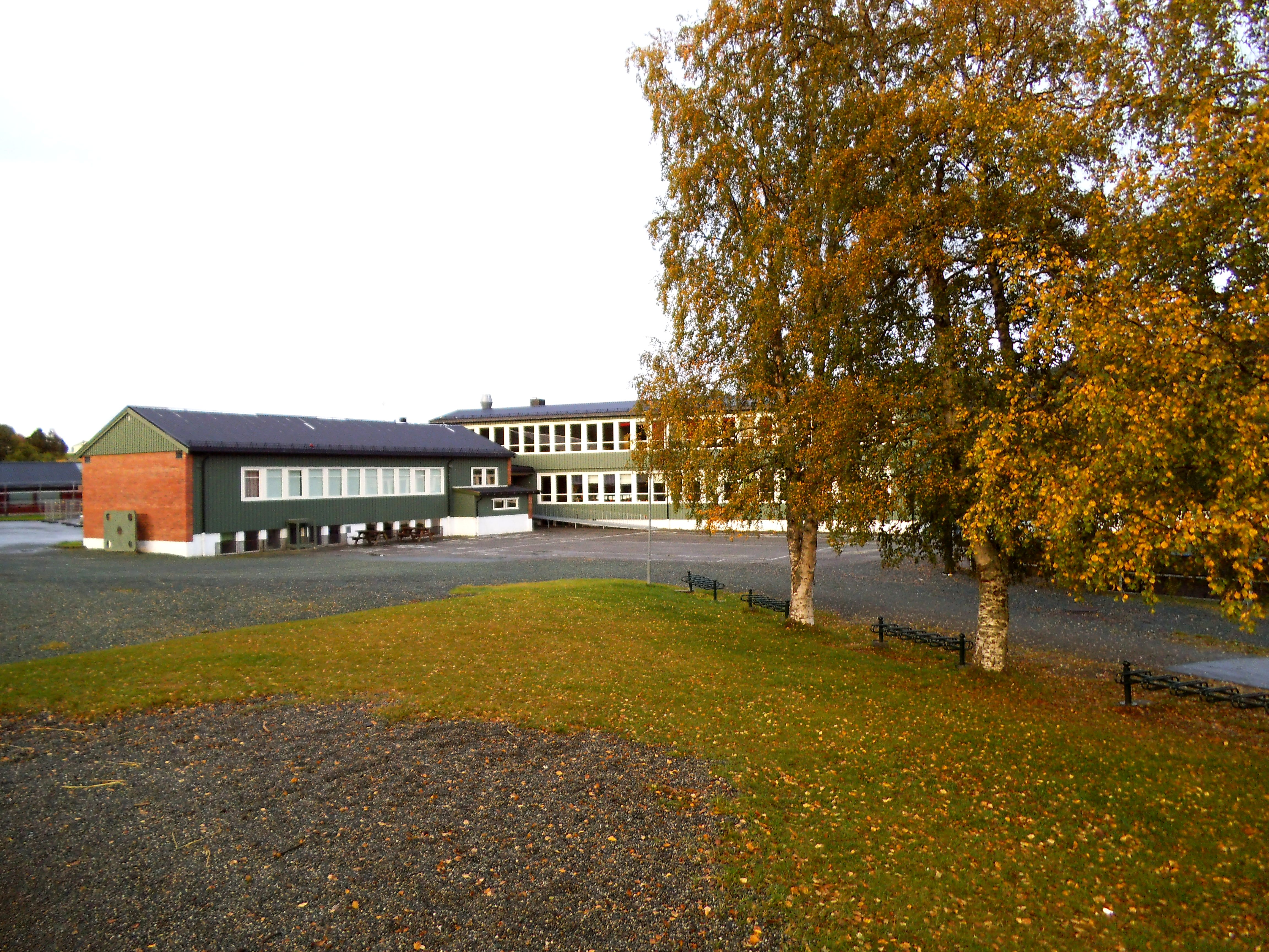 Barneskoledelen av Eid skole (Elementary school in Korsvegen).